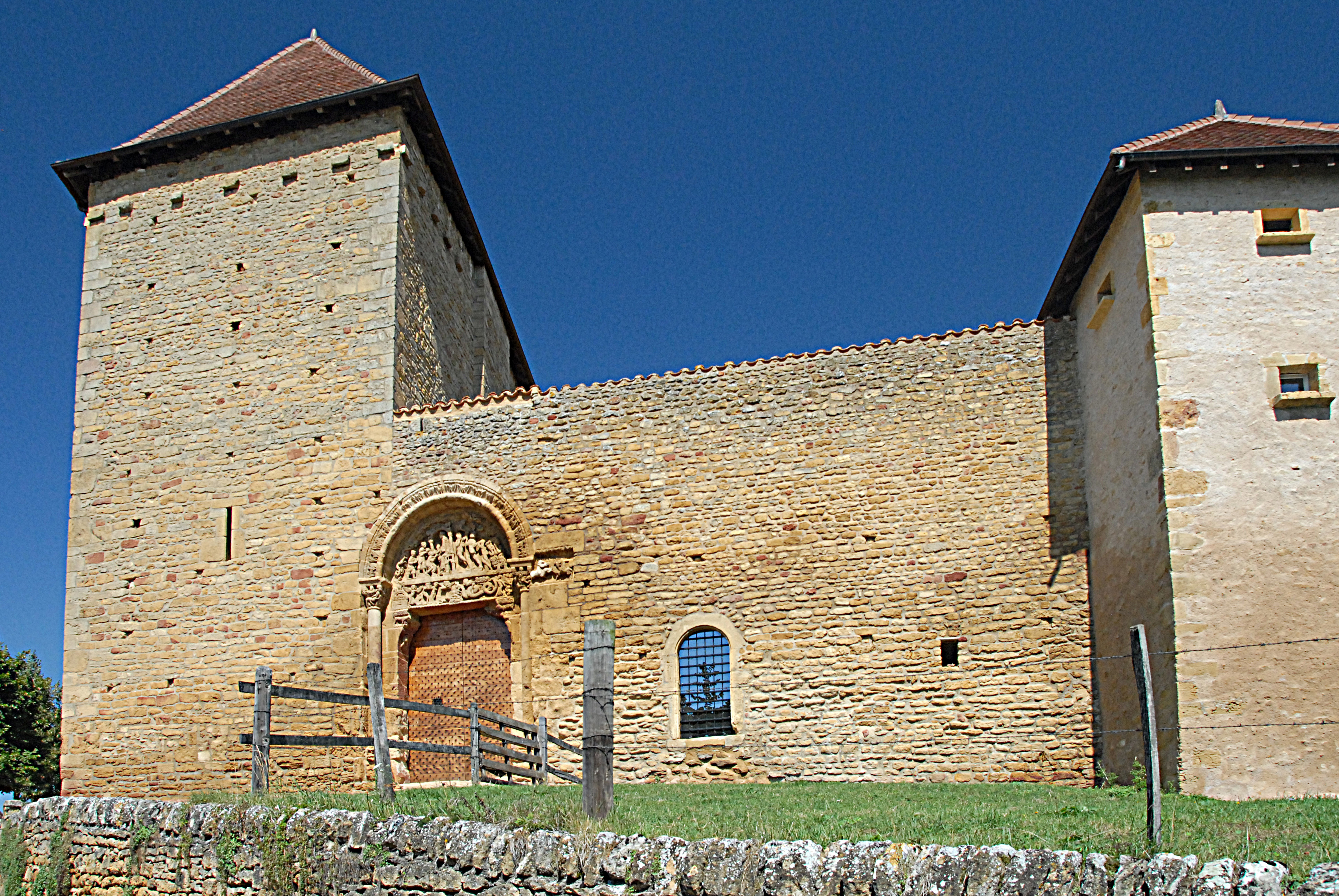 Südportal Kloster, ehem. Klostergebäude